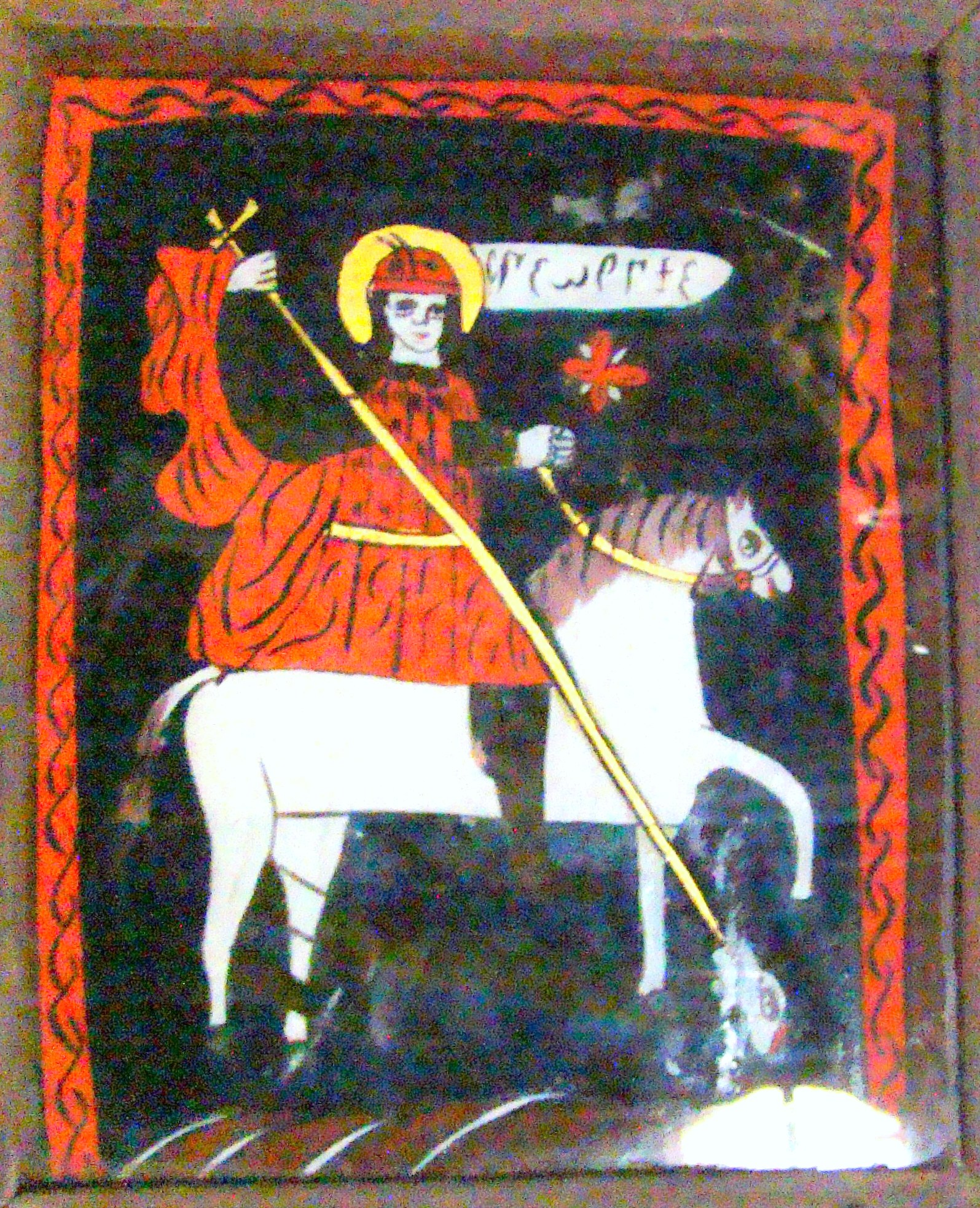 Biserica de lemn "Cuvioasa Paraschiva" , sat STEJERA; comuna MIREŞU MARE